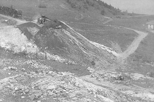 Кар'єри Гамори